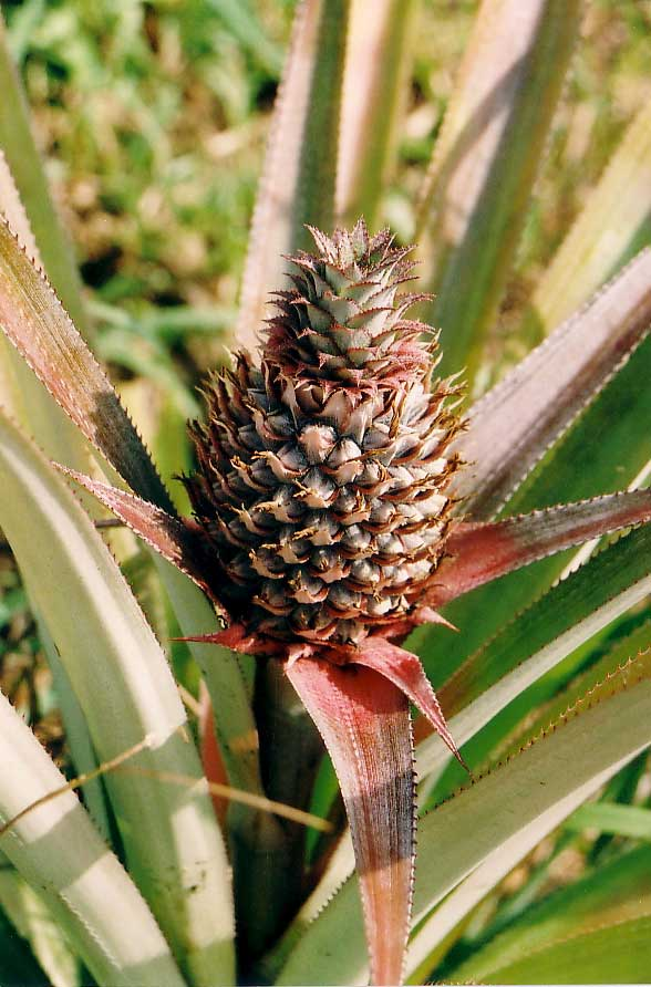 Young Pineapple, Koh Chang, Thailand